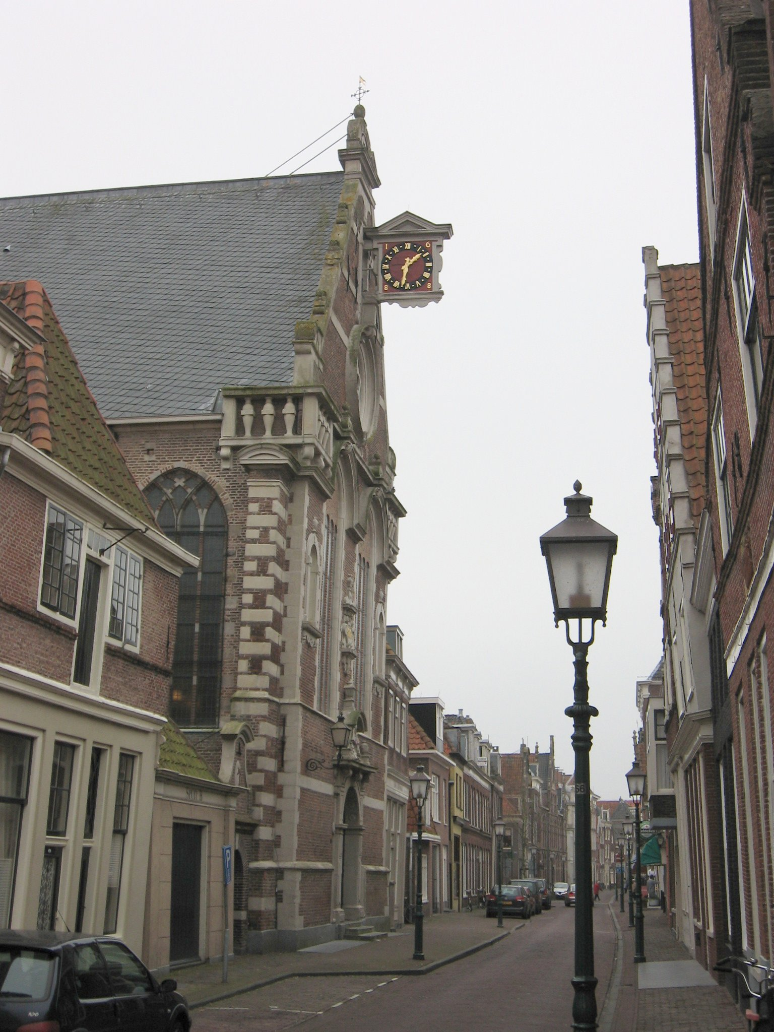 Hoorn, dec 2006